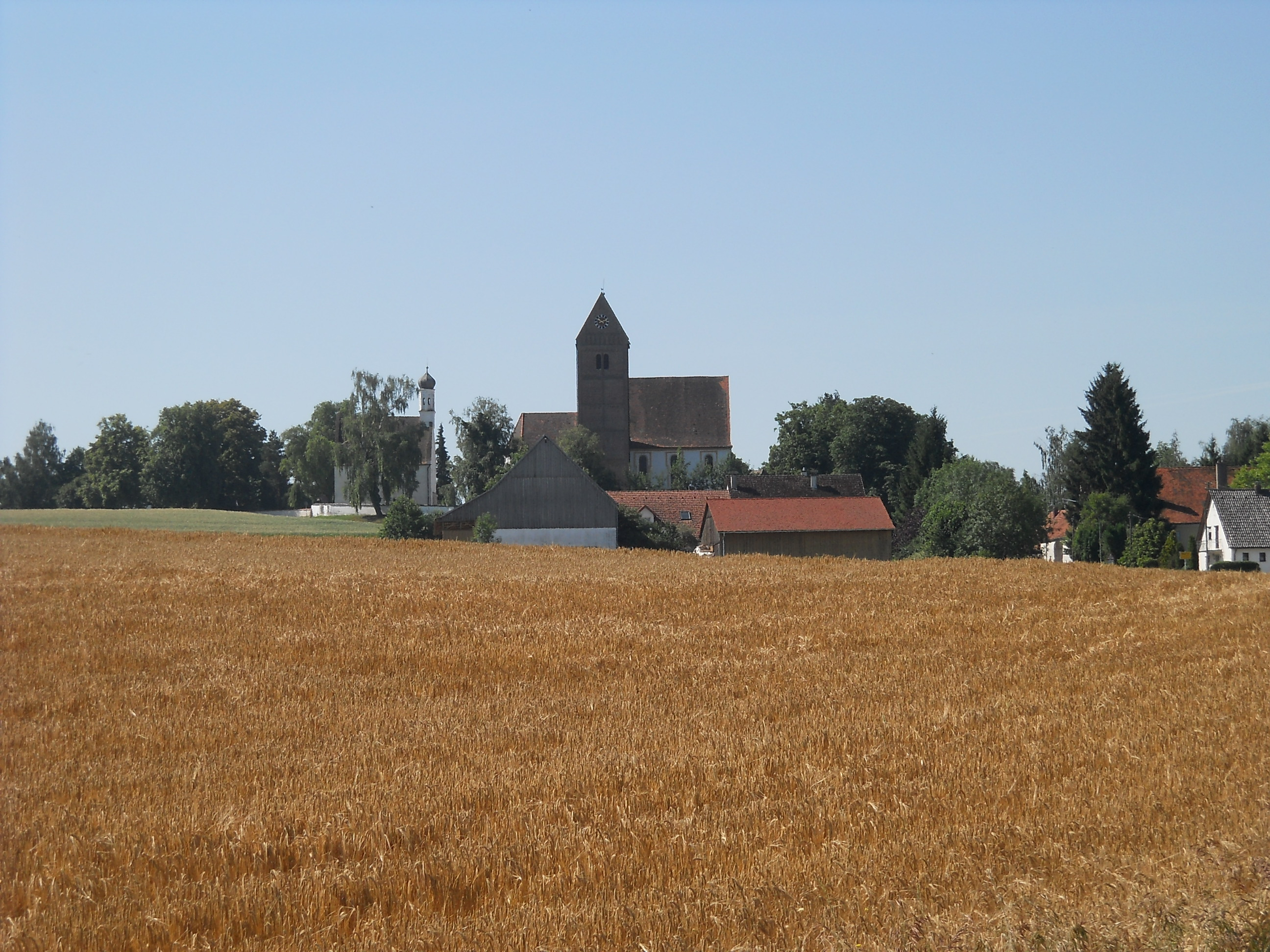 Gempfing (Ortsteil von Rain am Lech im Landkreis Donau-Ries), Kath. Pfarrkirche St. Vitus